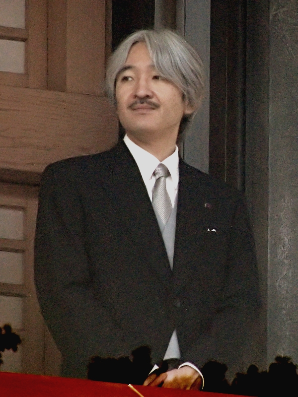 天皇誕生日の一般参賀にて